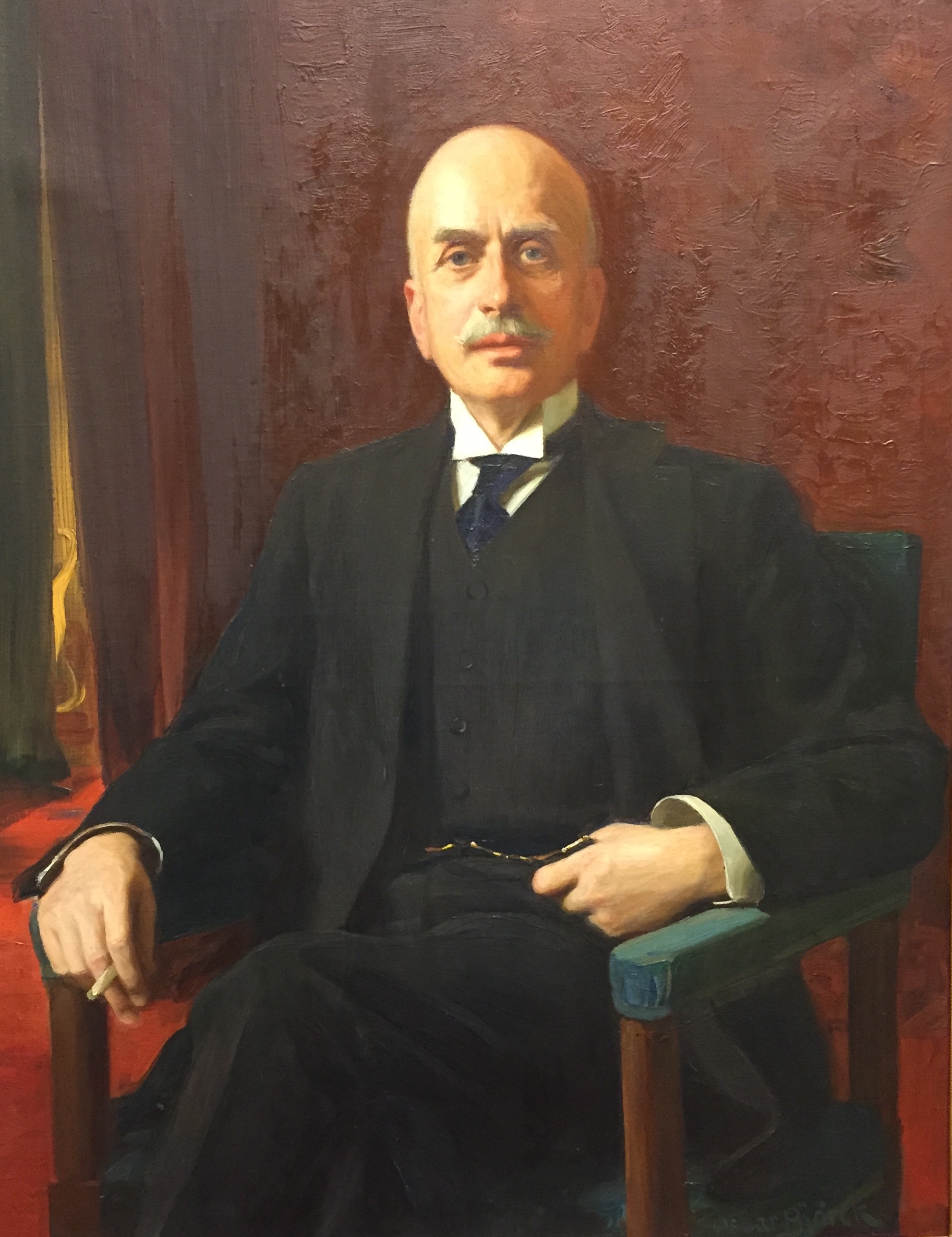 Porträtt (något beskuret) av justitierådet Edvard Cassel. Porträttet målat 1913 av Oscar Björk